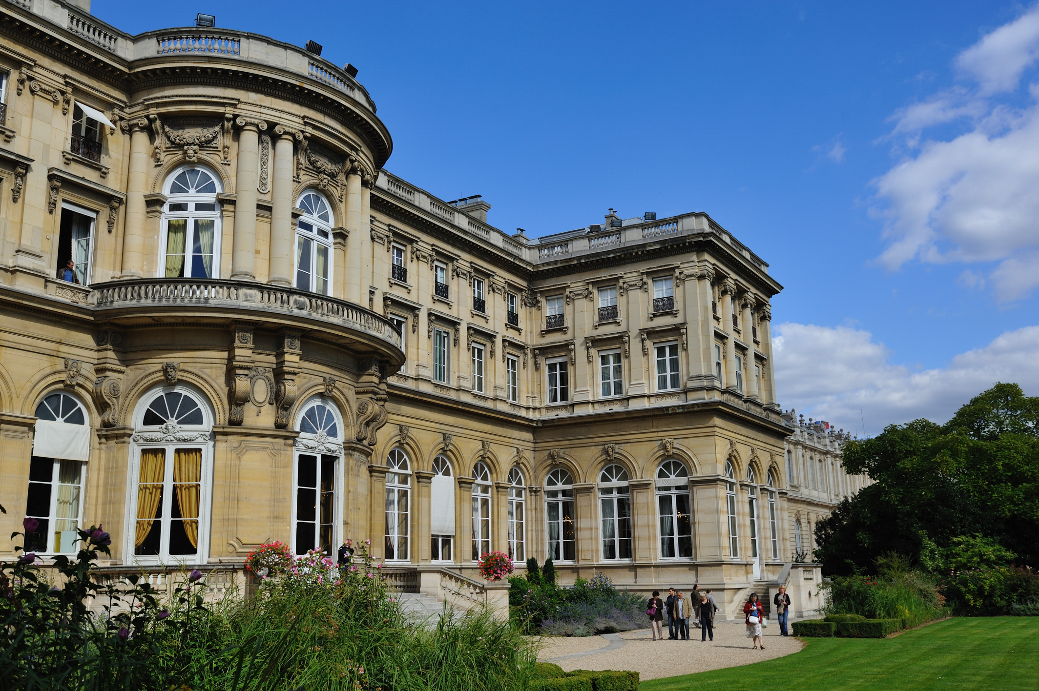 Hôtel du ministre des Affaires étrangères et européennes, 37 quai d'Orsay, Paris, France : façade côté jardin Photo prise à l'occasion des journées européennes du patrimoine 2010